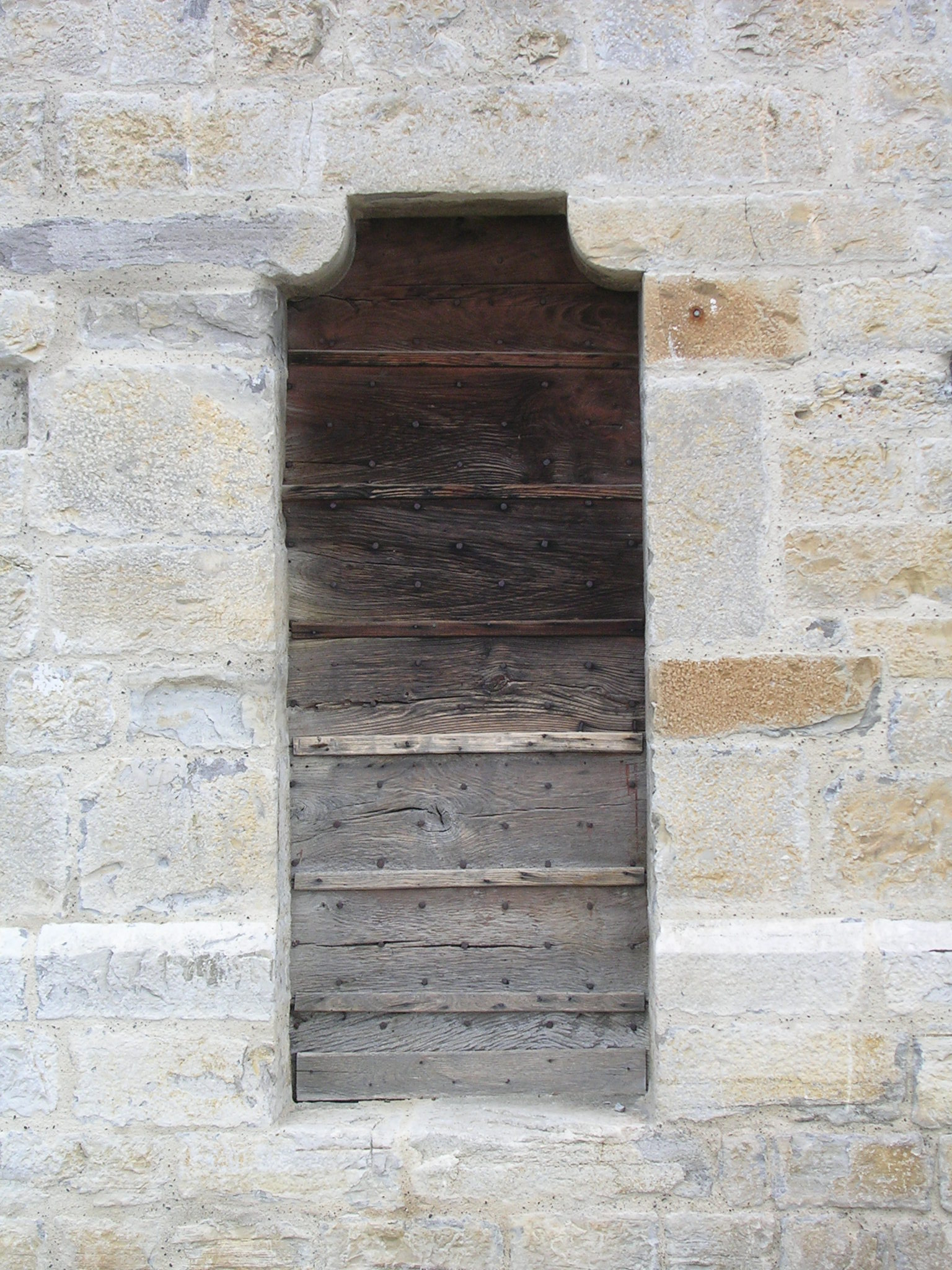 Porte des cagots de l'église Saint-André de Sauveterre-de-Béarn, dans le département français de Sauveterre-de-Béarn.